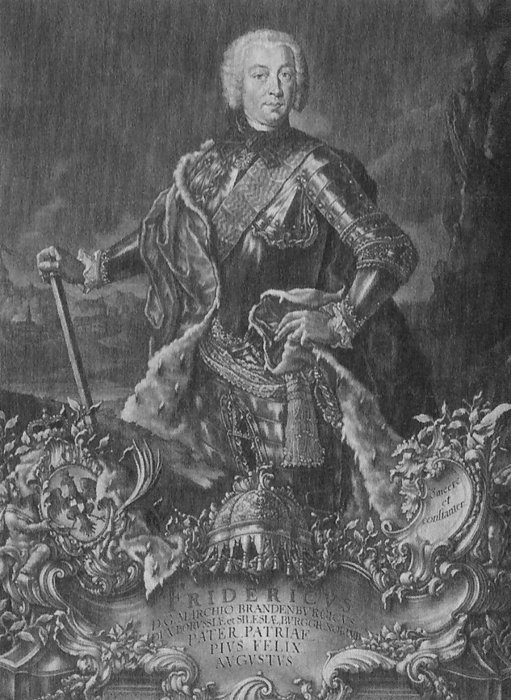 Markgraf Friedrich III. (Brandenburg-Bayreuth) (1711-1763)